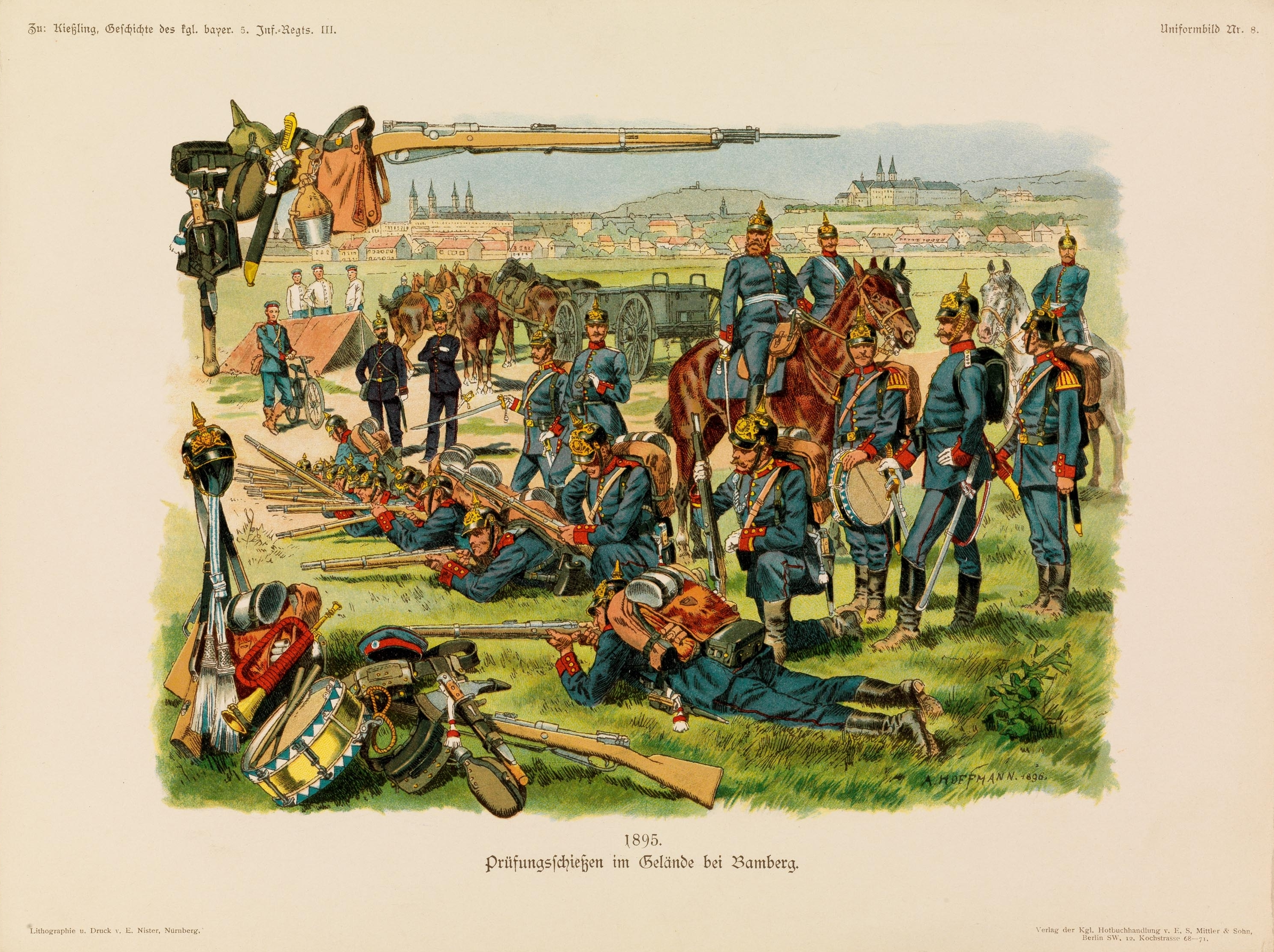 Uniform-Bilder zur Geschichte des Königl. Bayer. 5. Infanterie-Regiements Grossherzog Ernst Ludwig von Hessen. Lithographie und Druck v. E. Nister, Nürnberg. Verlag der Kgl. Hofbuchhandlung v. E. S. Mittler & Sohn, Berlin.